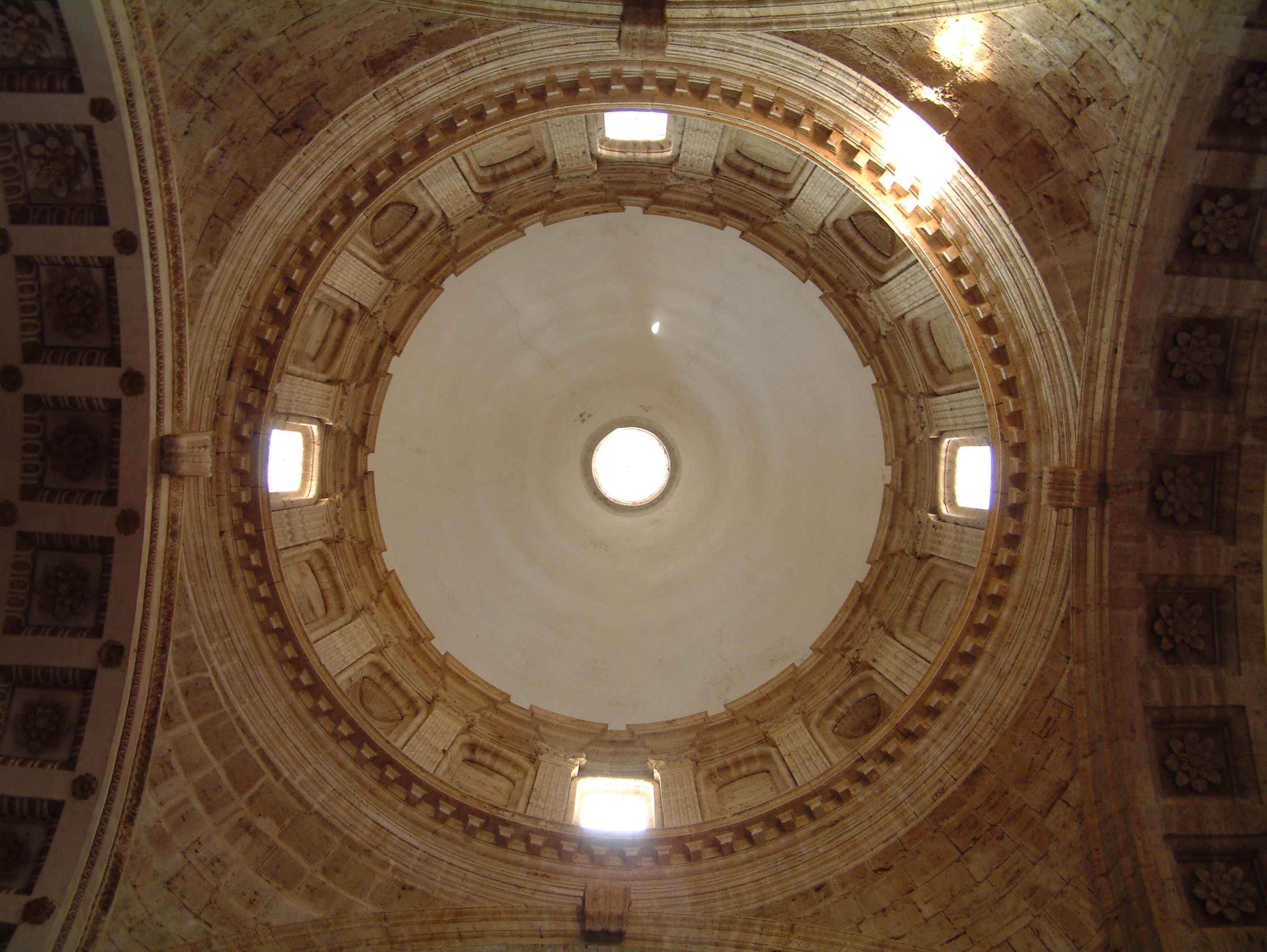 Montepulciano - Madonna di San Biagio